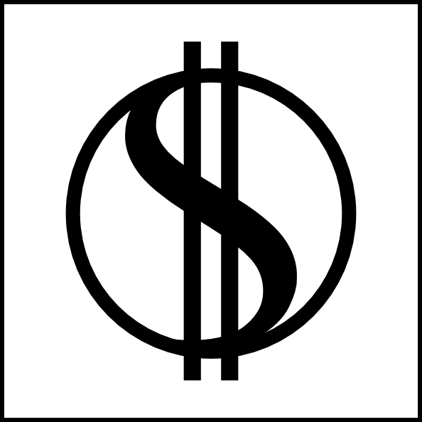 Symbole de Libertatis Æquilibritas